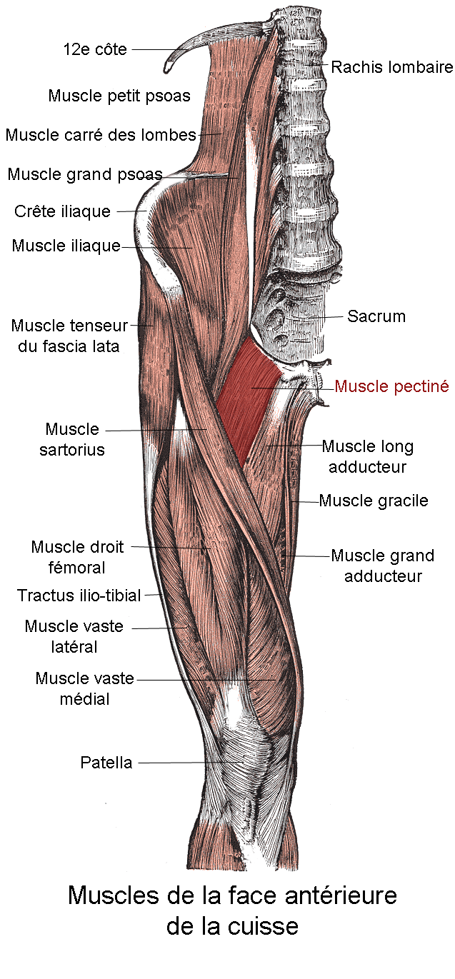 Muscle pectiné. Anatomie humaine